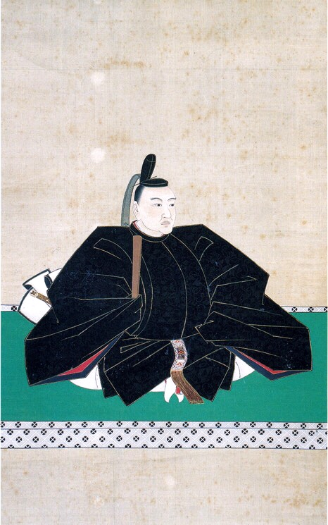 法雲寺所蔵の北条氏直の肖像画。1803年に、河内国狭山藩主北条氏喬が絵師に描かせ、奉納したもの。